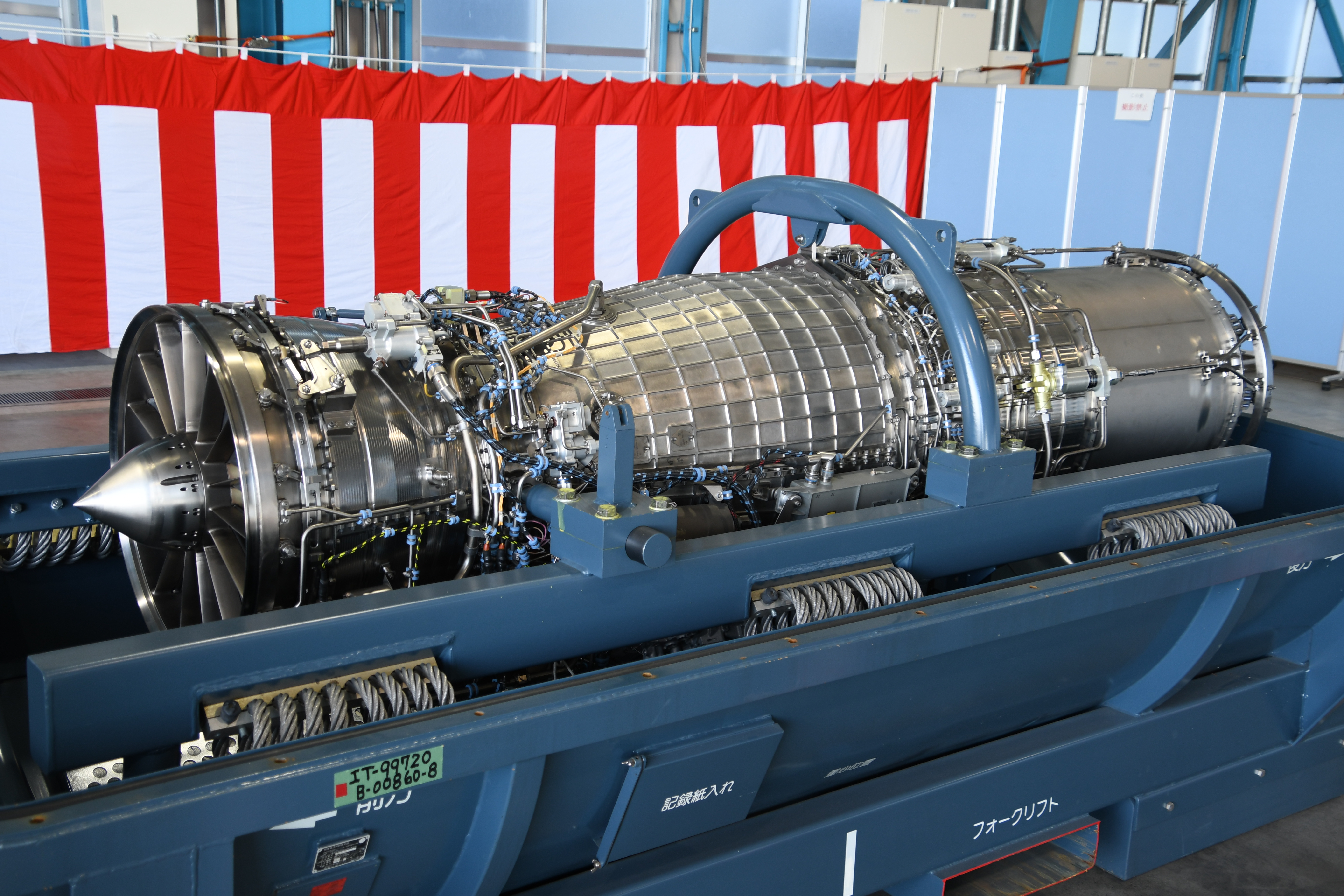 石川島播磨重工業（現：IHI） XF5-1ターボファン・エンジン 右前面。2019年11月10日 航空自衛隊岐阜基地にて。